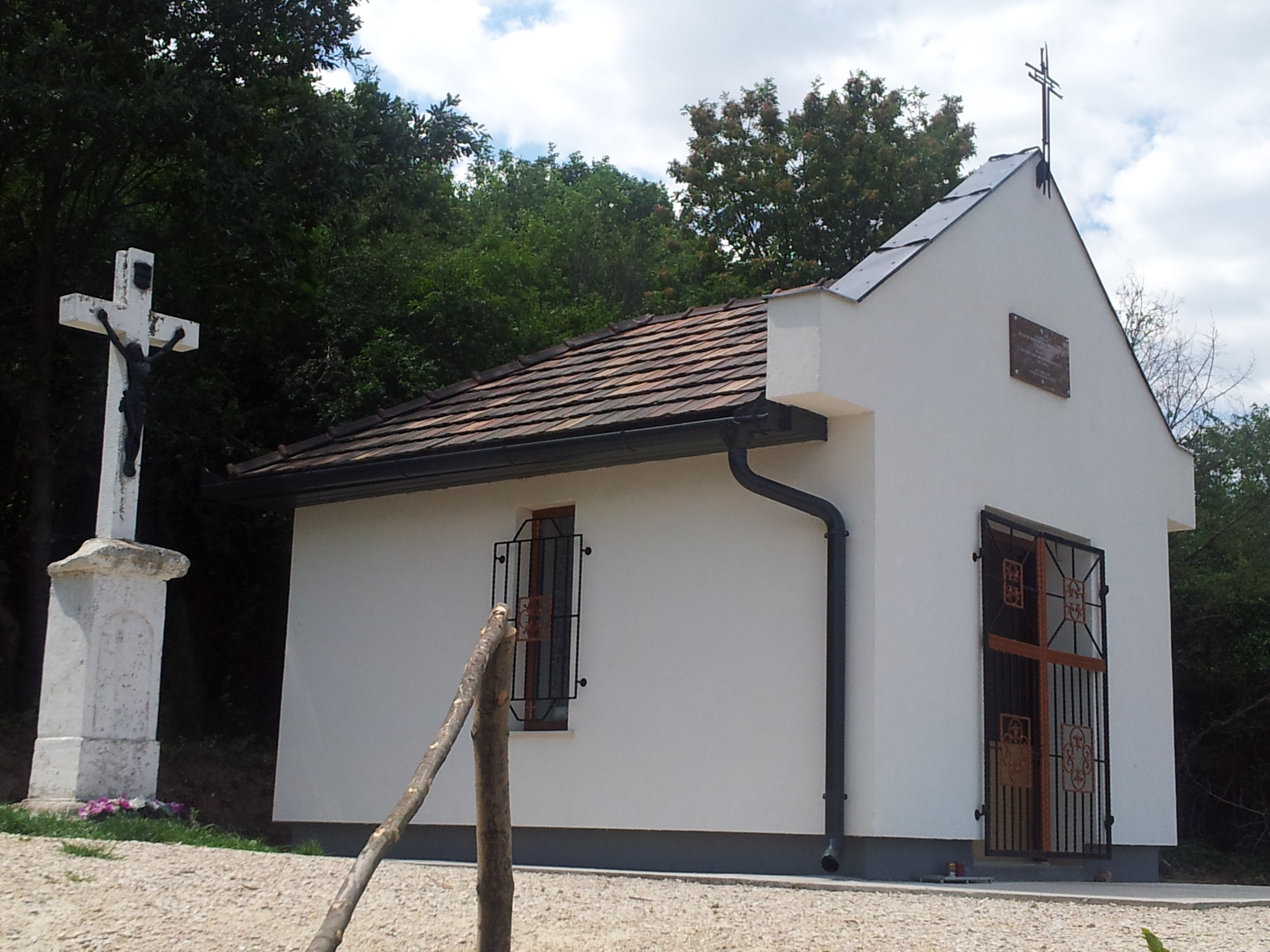 Mária Kápolna Csolnok